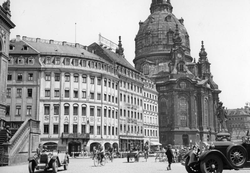 Dresden, Sachsen Neumarkt mit Frauenkirche